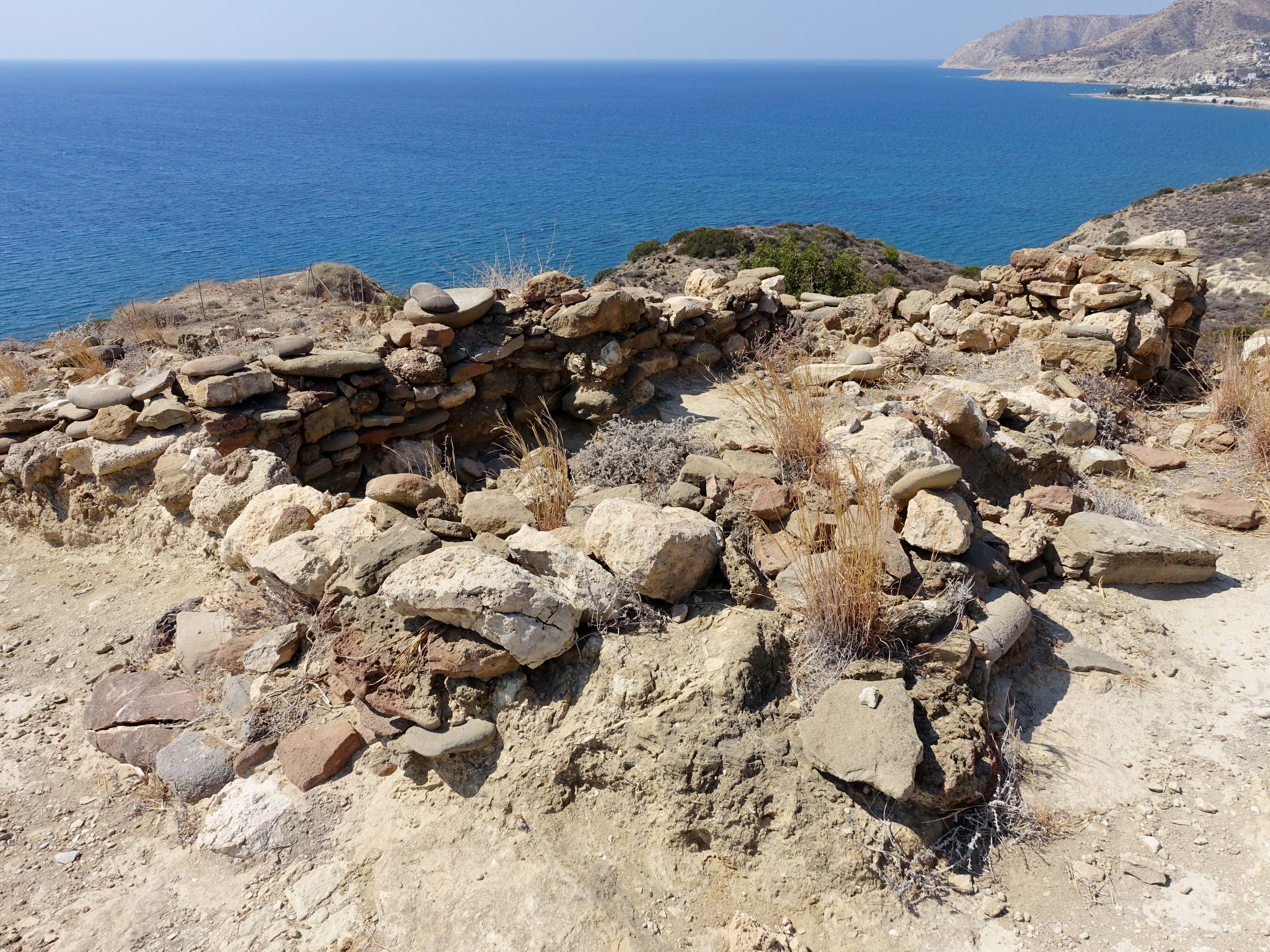 Ausgrabungsstätte von Fournou Koryfi bei Myrtos, Kreta, Griechenland